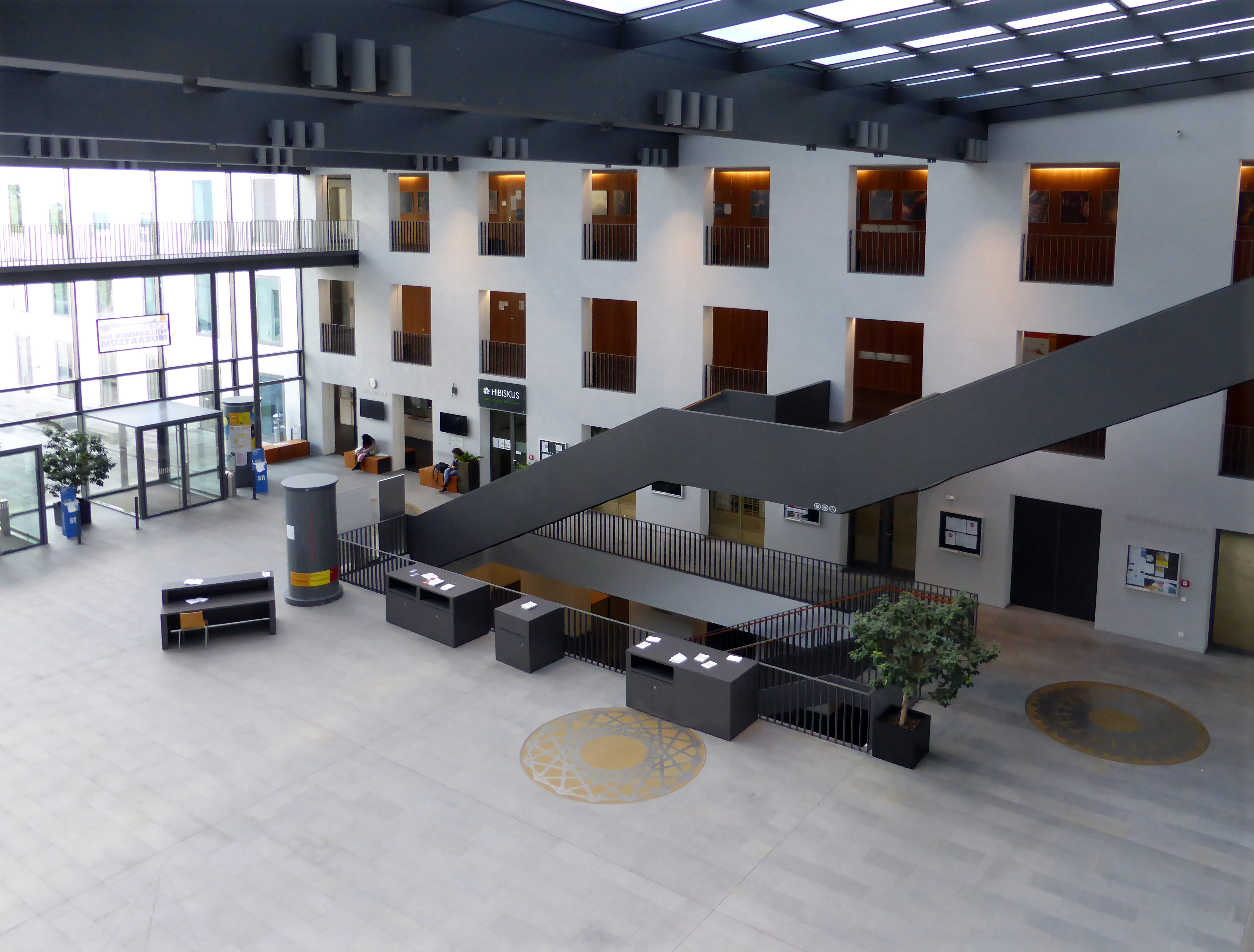 Neubau der Universität Mozarteum, Salzburg.